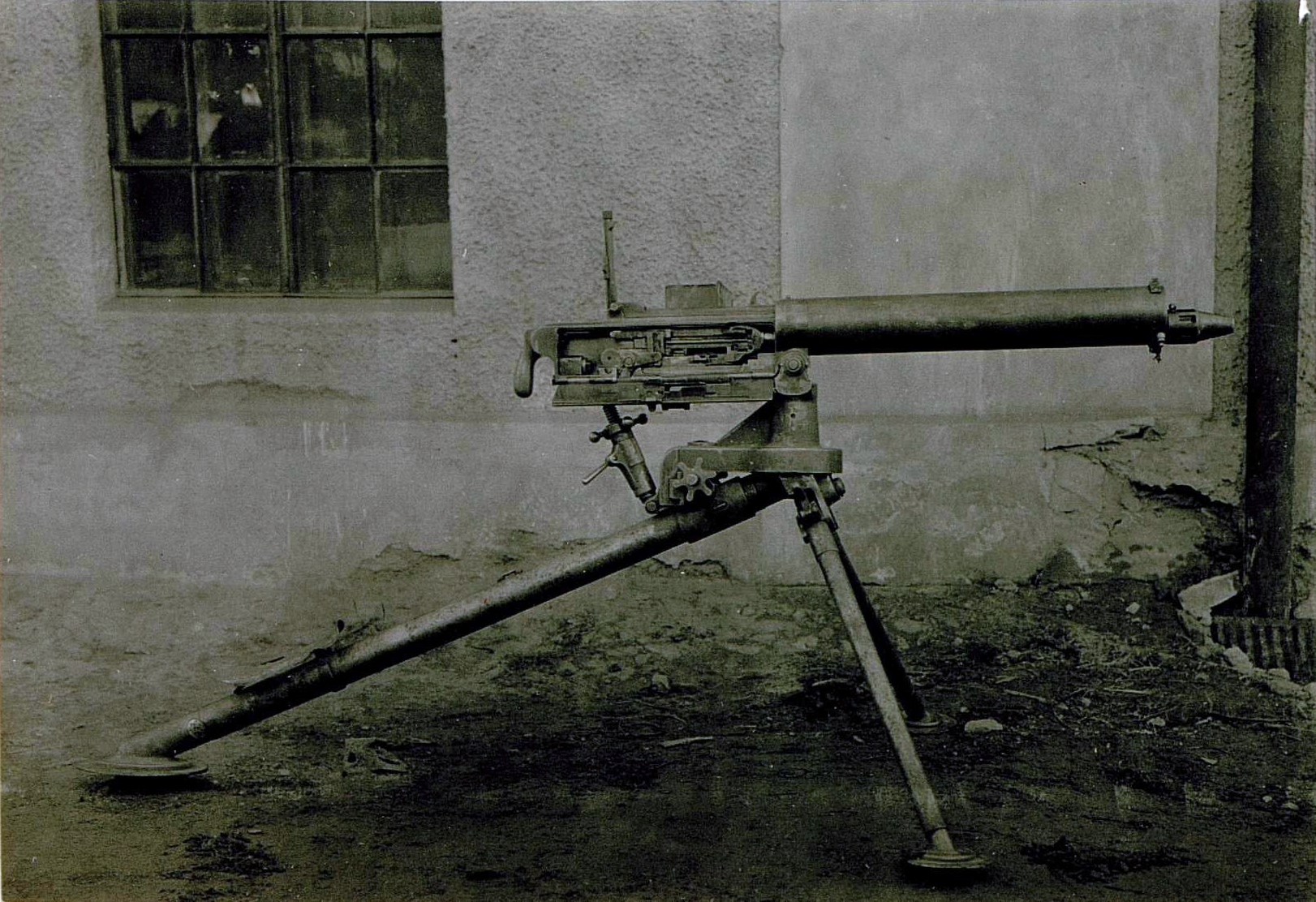 Italijanska strojnica Perino M1908.